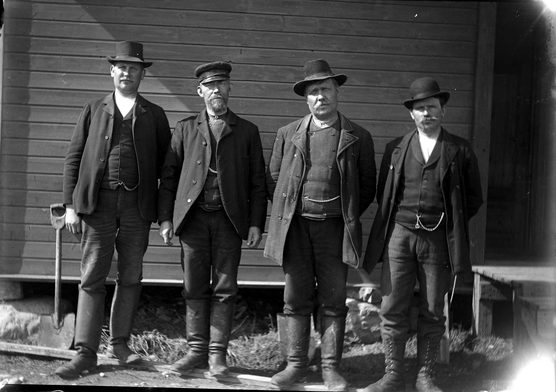 Gruppbild av arbetsförmän vid Läten Hospitalbygge.